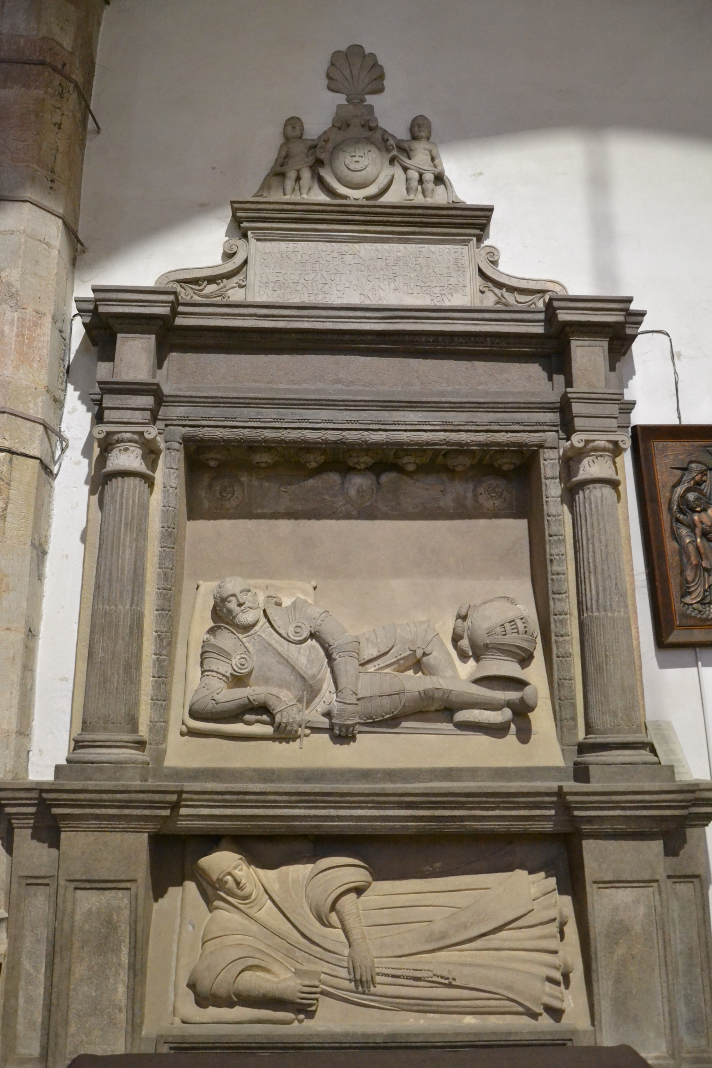 Nagrobek Jana Jędrzejowskiego herbu Jastrzębiec, dziedzica Potoka, i Elżbiety Jędrzejowskiej z około 1597 roku w kościele franciszkanów w Krośnie. Poddany renowacji po pożarze kościoła w 1872 roku